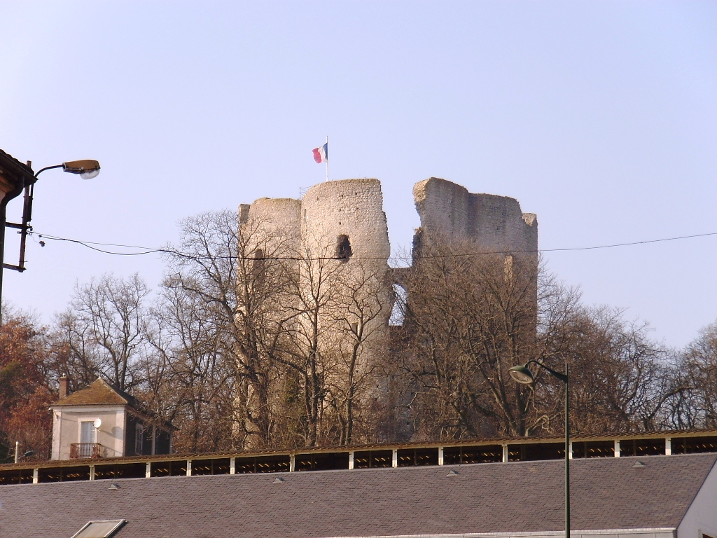 Tour de Guinette à Etampes (91) .